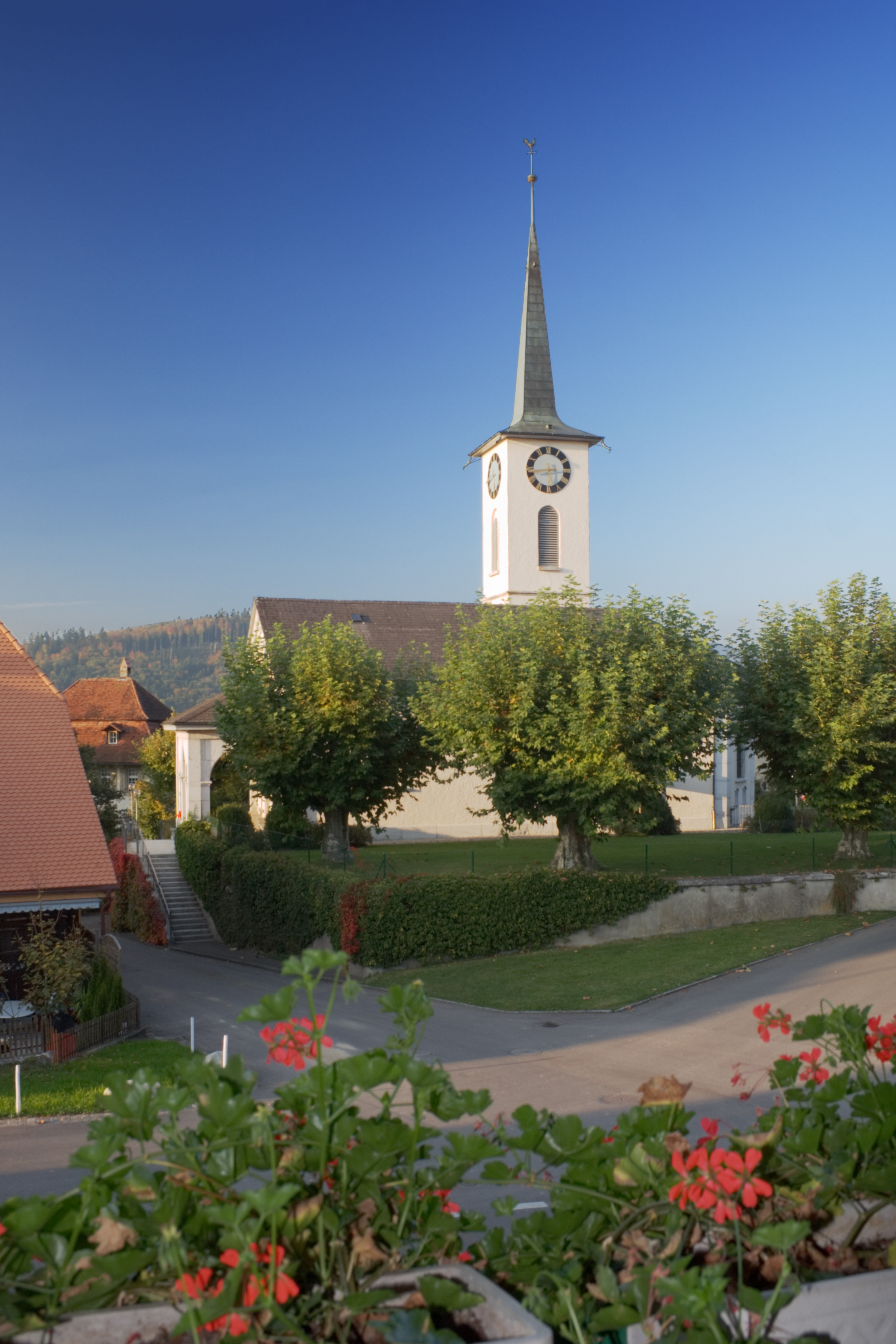 reformierte Kirche von Diessbach bei Büren, SchweizAufnahme mit Polfilter